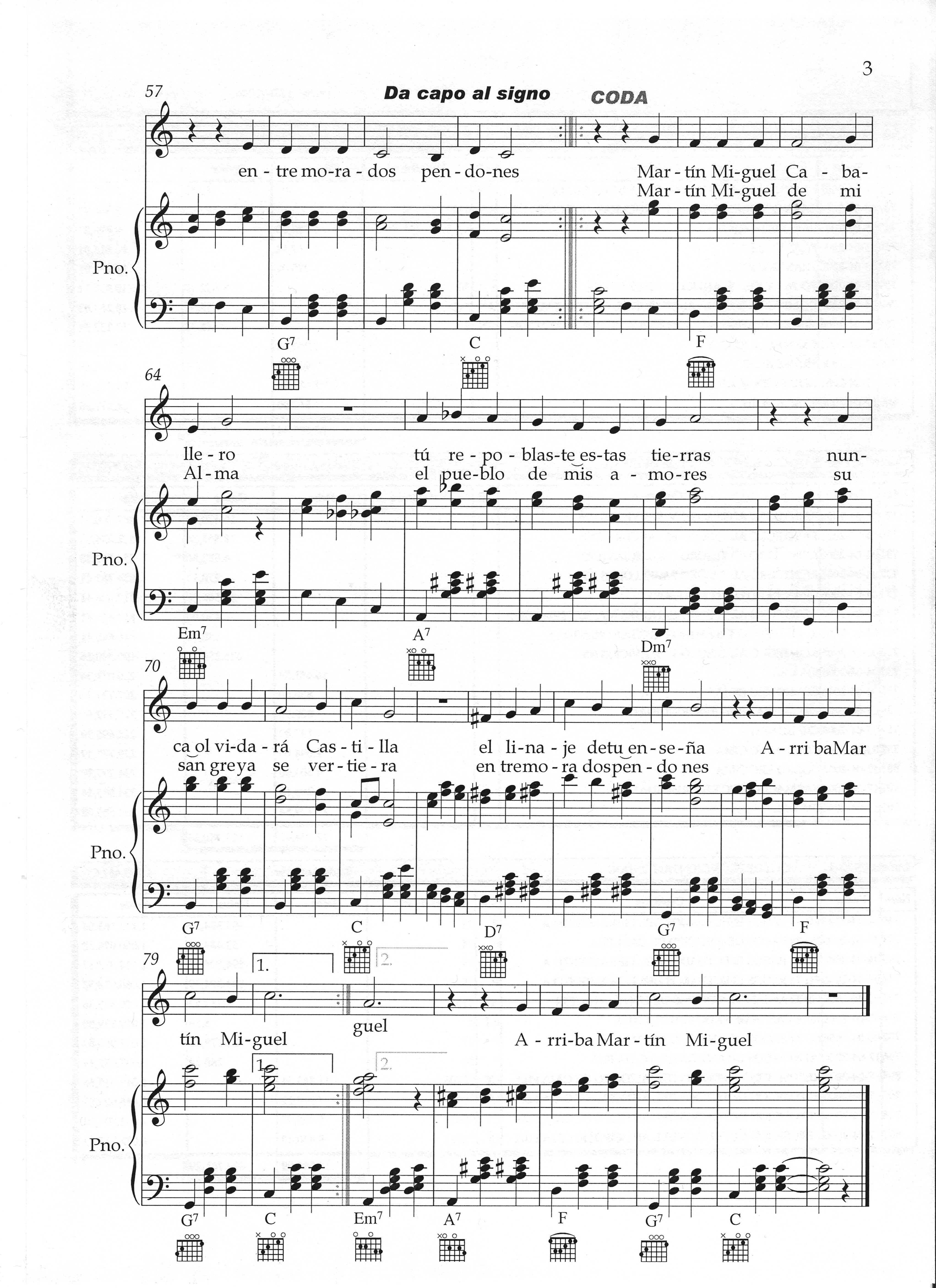 Hoja 3 del Himno a Martin Miguel. Partitura para piano y voz